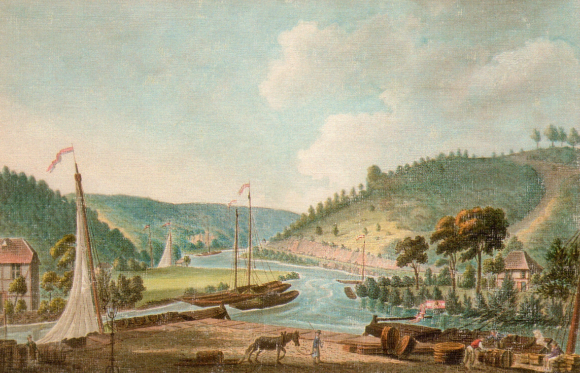 Mündener Hafen an der Bremer Schlagd und Questenberg, links der Tanzwerder, rechts der Doktorwerder